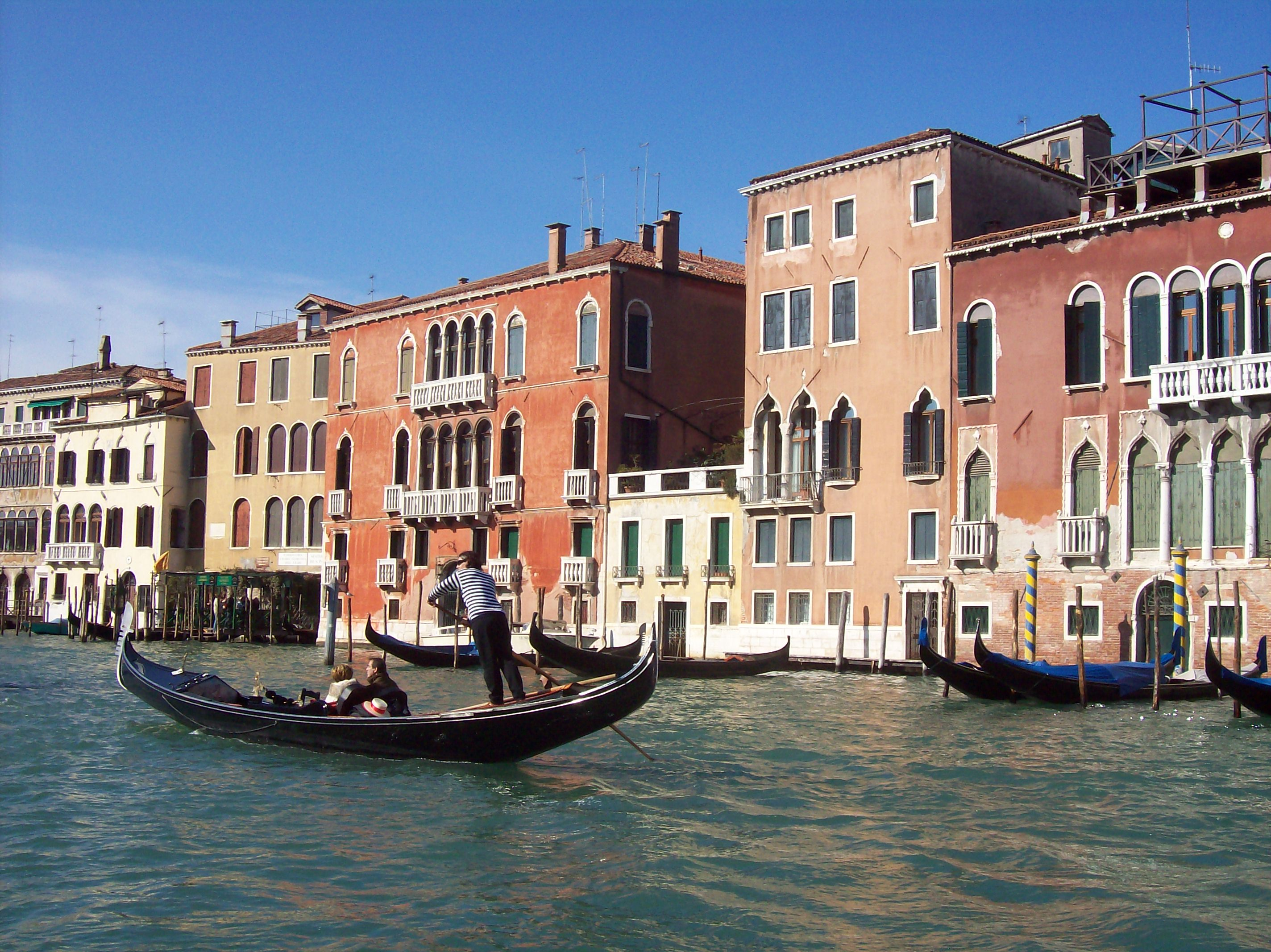 Venice (grand canal)